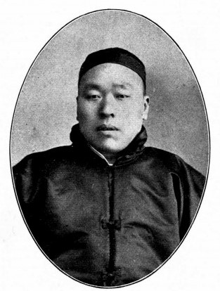 中文（台灣）: 中華民國國會議員